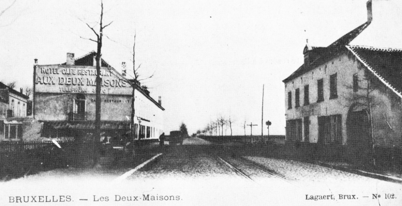 La chaussée de Louvain à hauteur de la rue des Deux Maisons